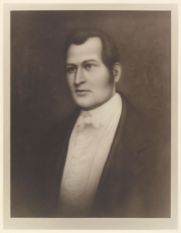 James H. Peck (1790-1836)